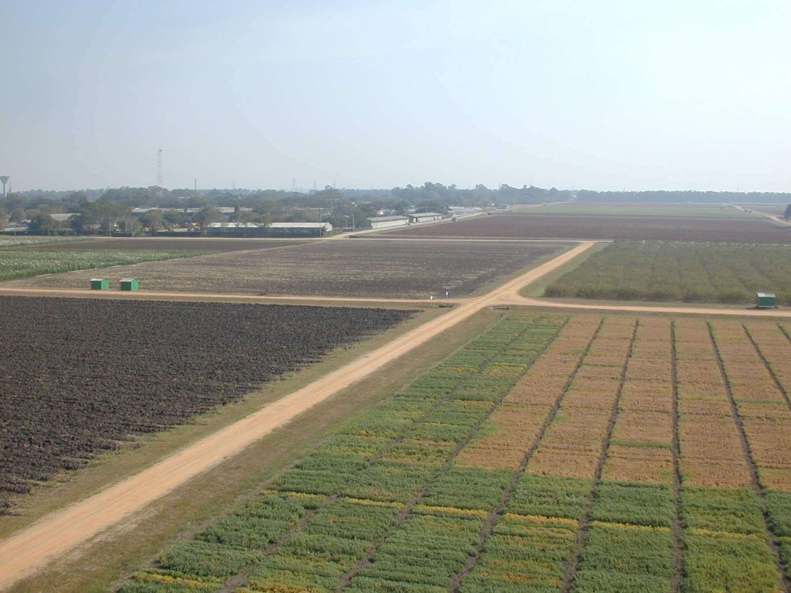 ICRISATの圃場